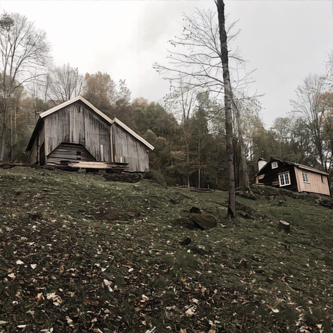 Husmannsplassen Lia i Gjerstad. Ukjent fotograf. Fra Riksantikvarens Kulturminnesøk.